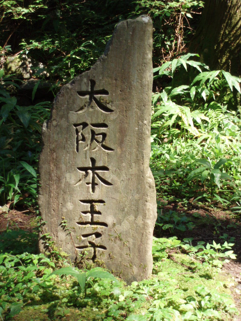 Monumnet_of_OSAKAMOTO-oji_remains